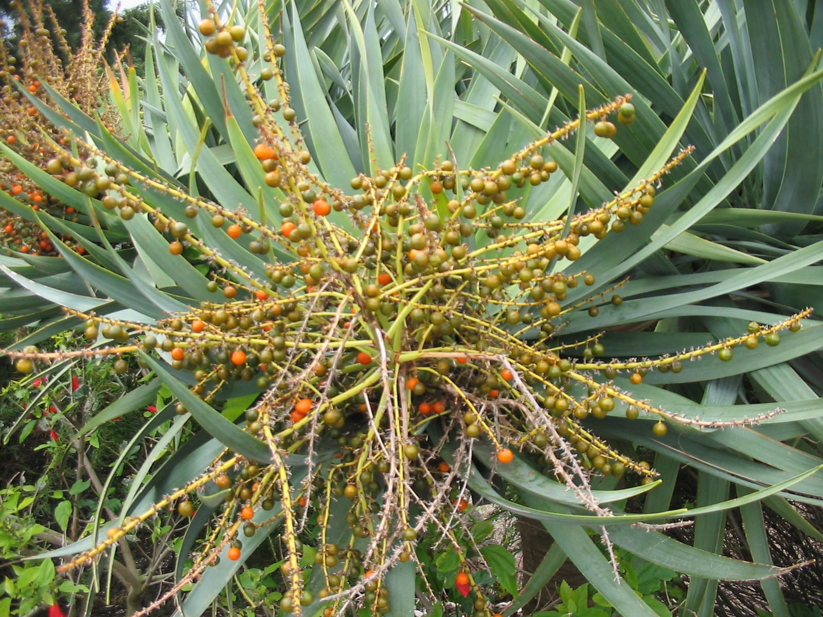 Drachenbaum (Dracaena draco) - Habitus